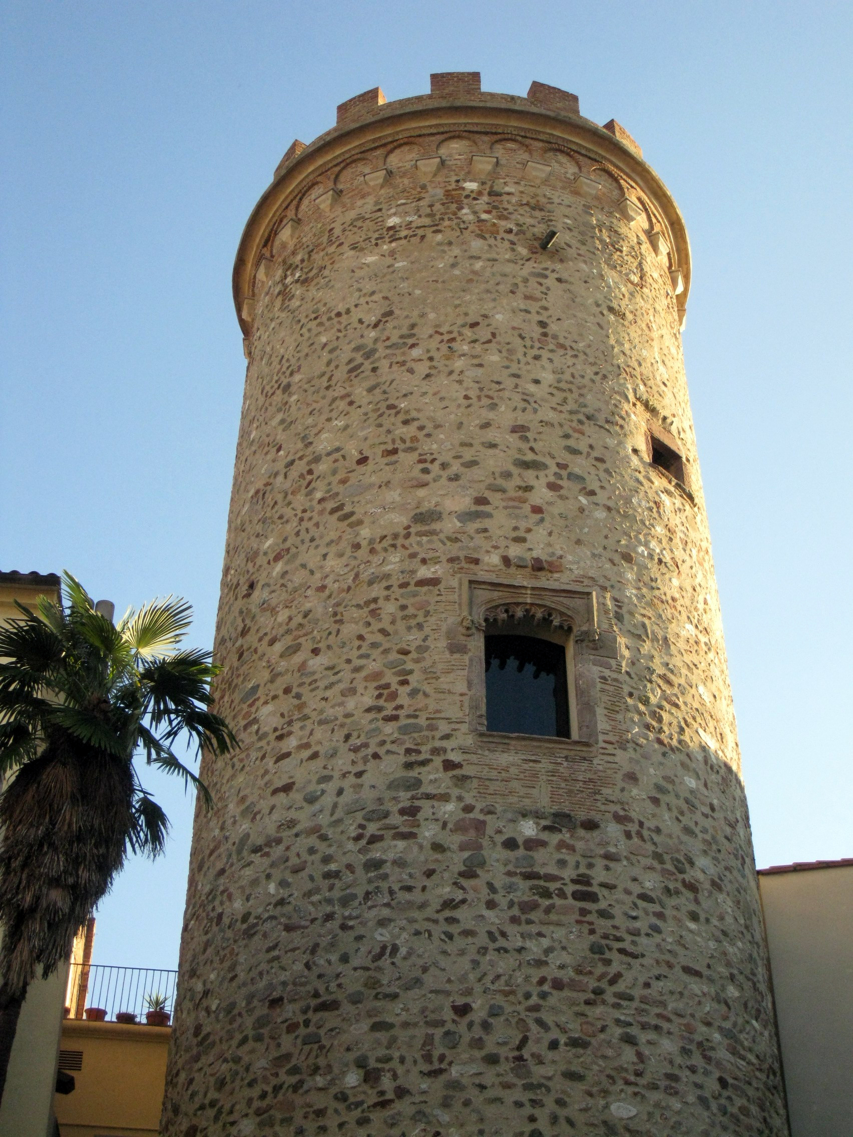 Torre del Palau, torre mestra de l'antic castell palau de Terrassa, l'únic vestigi que en queda.